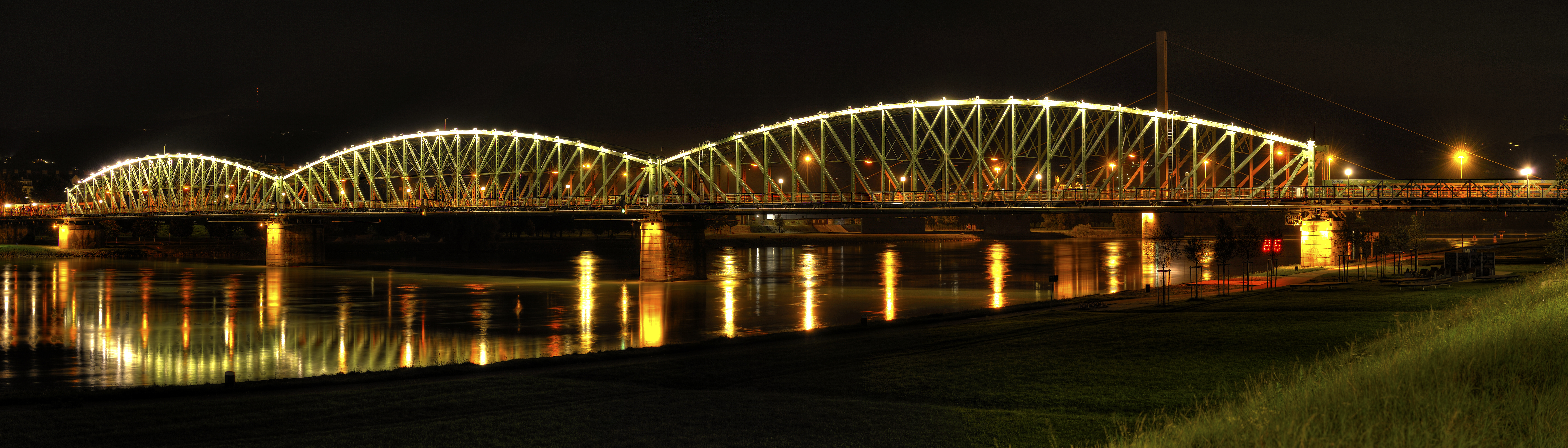 Eisenbahnbrücke Linz, HDR Panorama